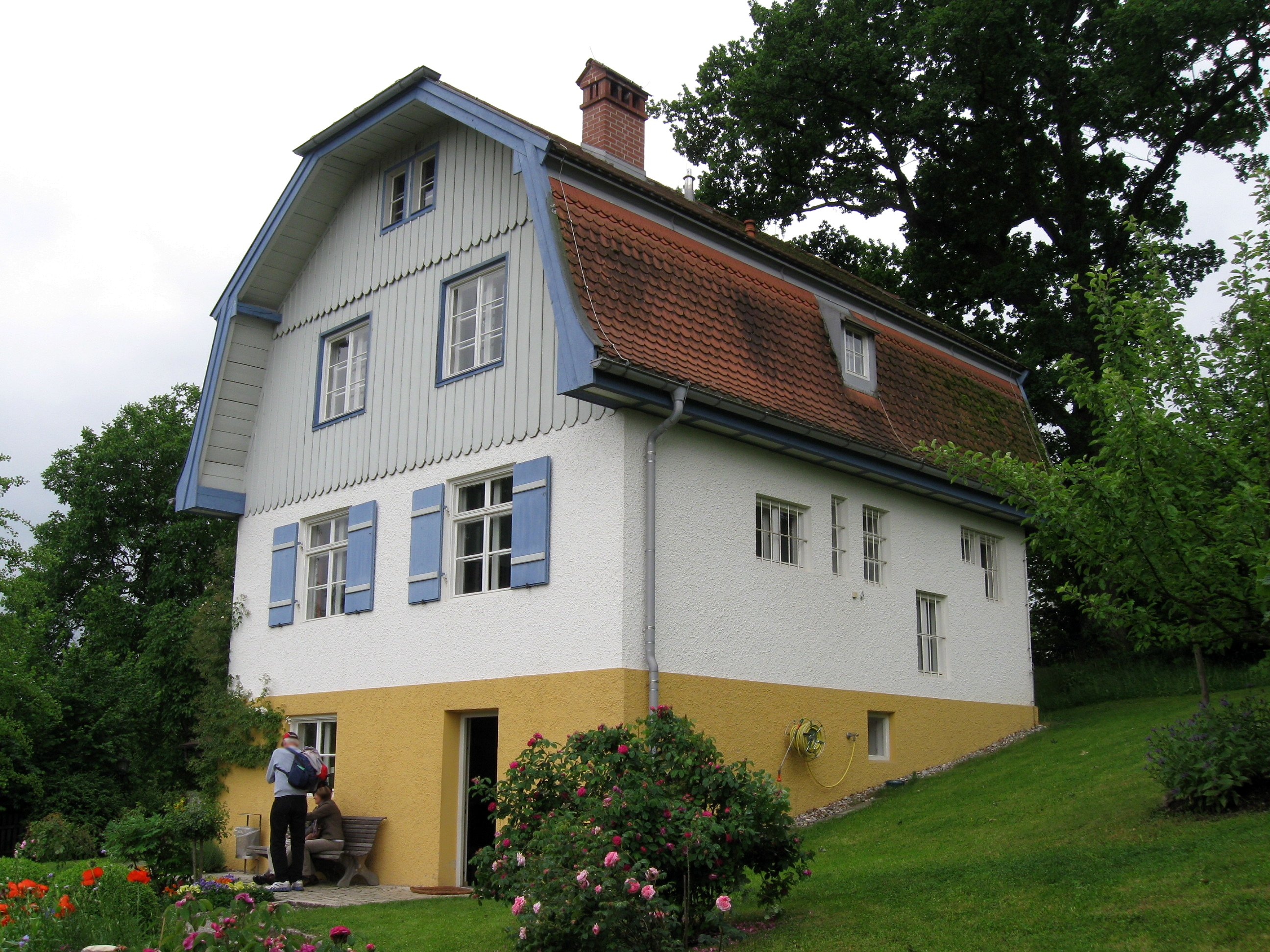 Kleines Wohnhaus mit Mansard-Satteldach, 1908 erbaut; Heim Wassily Kandinskys und Gabriele Münters